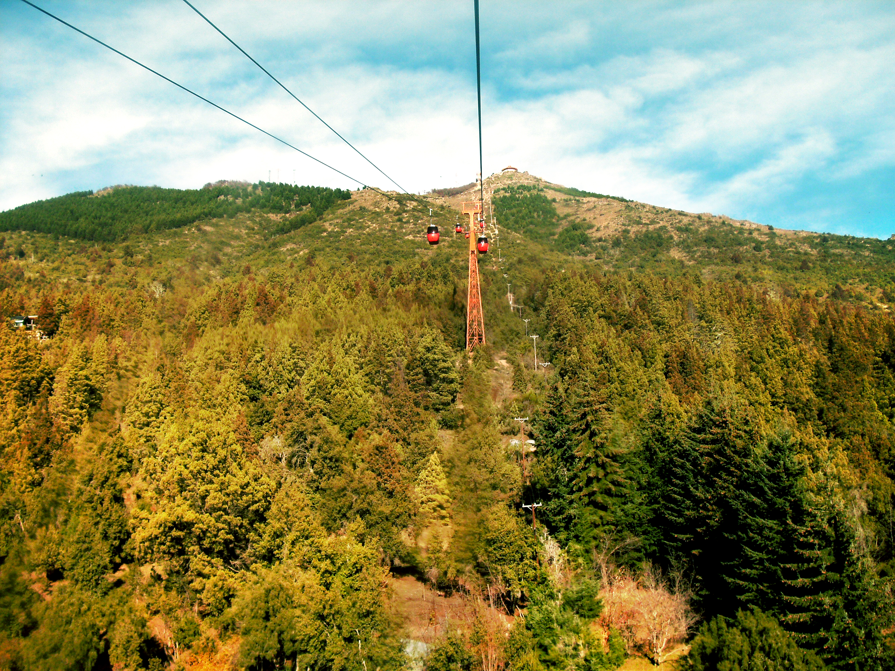 Ascención en teleférico al Cerro Otto, Bariloche, Argentina.